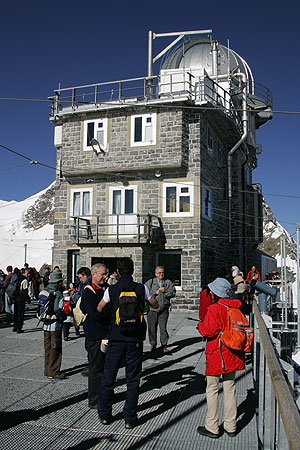 Jungfraujoch: Wetterstation Sphinx